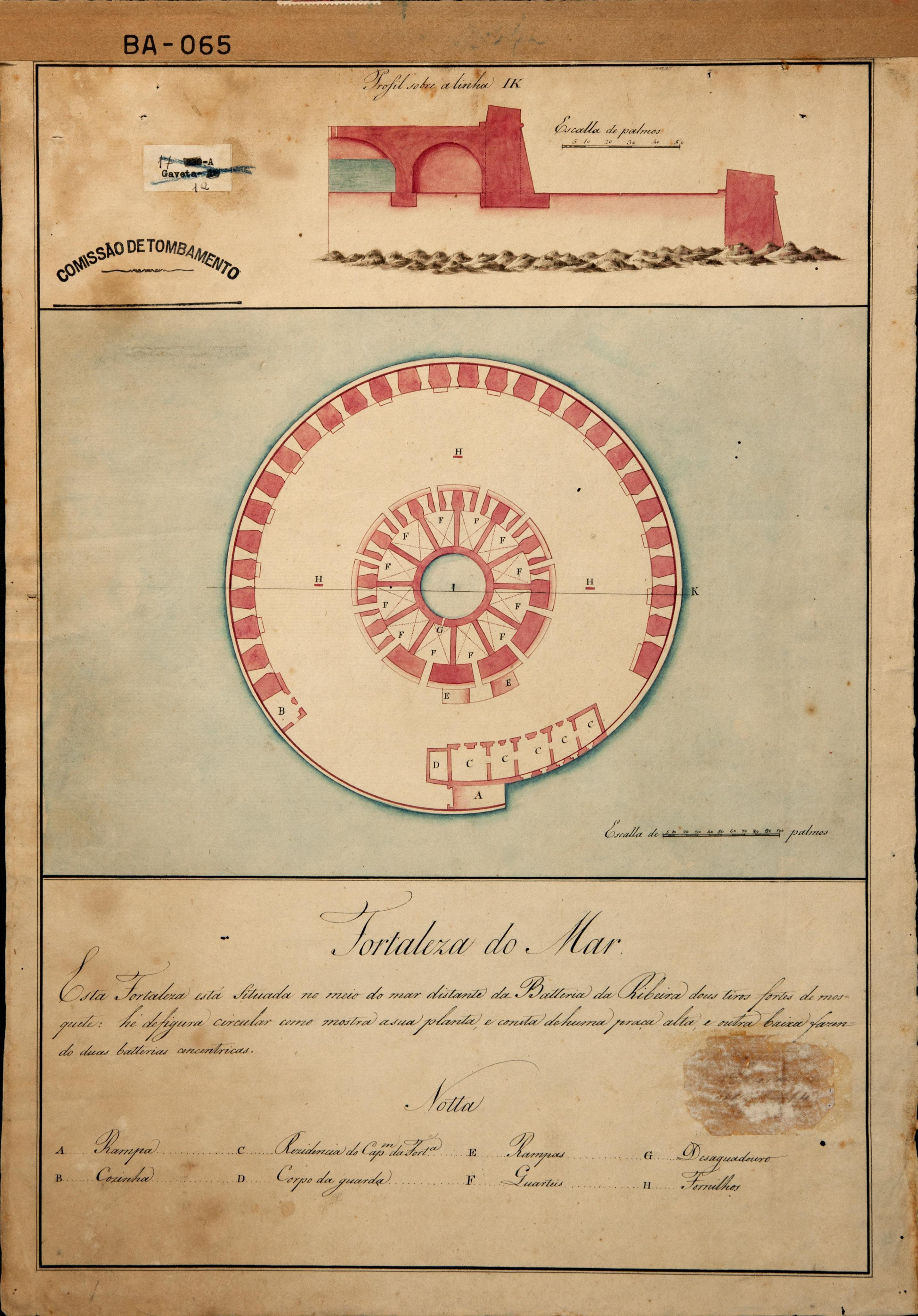 planta descritiva